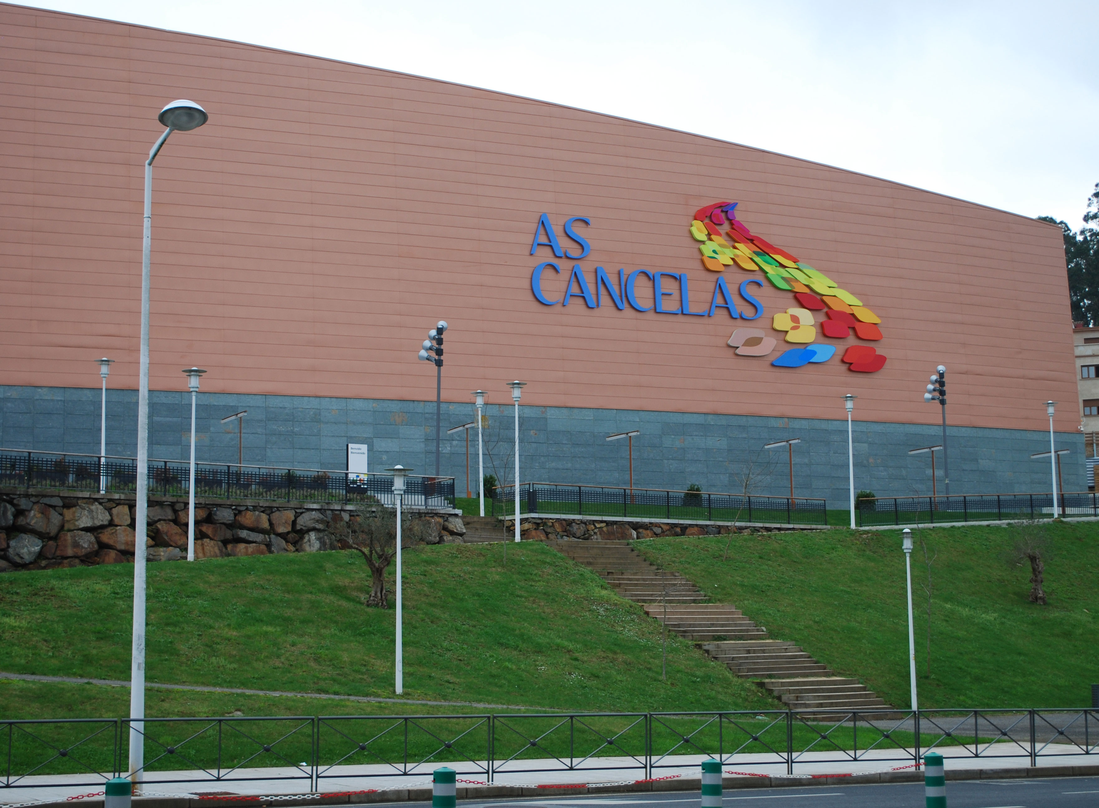 CC As Cancelas Santiago de Compostela A Coruña Galiza Spain